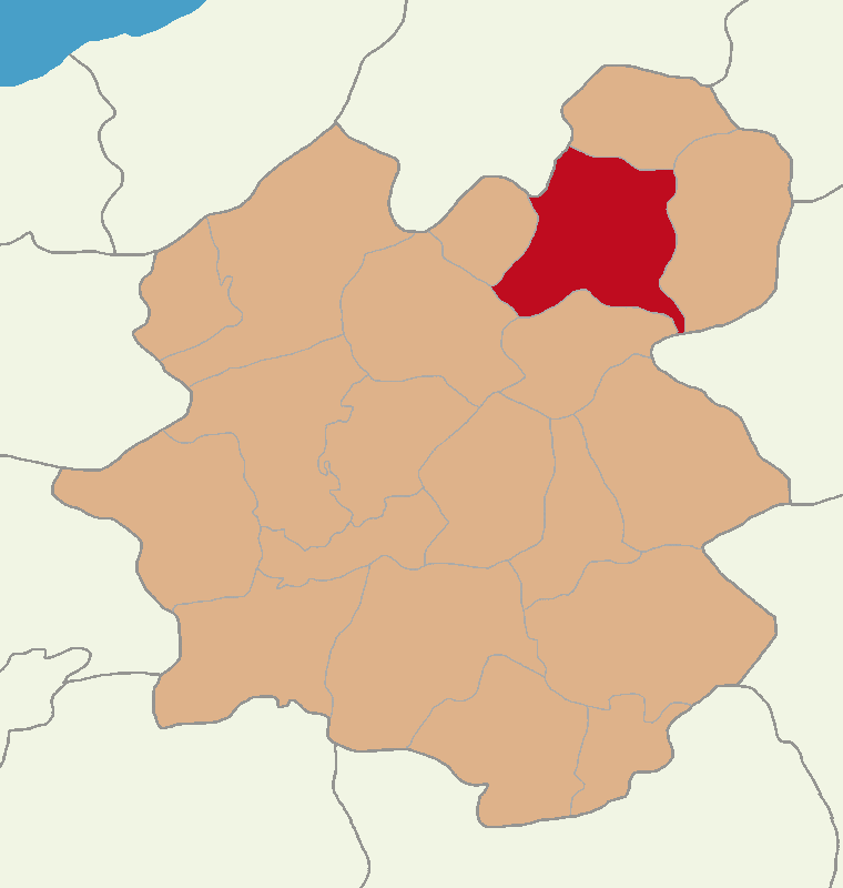 Oltu ilçesinin konumu